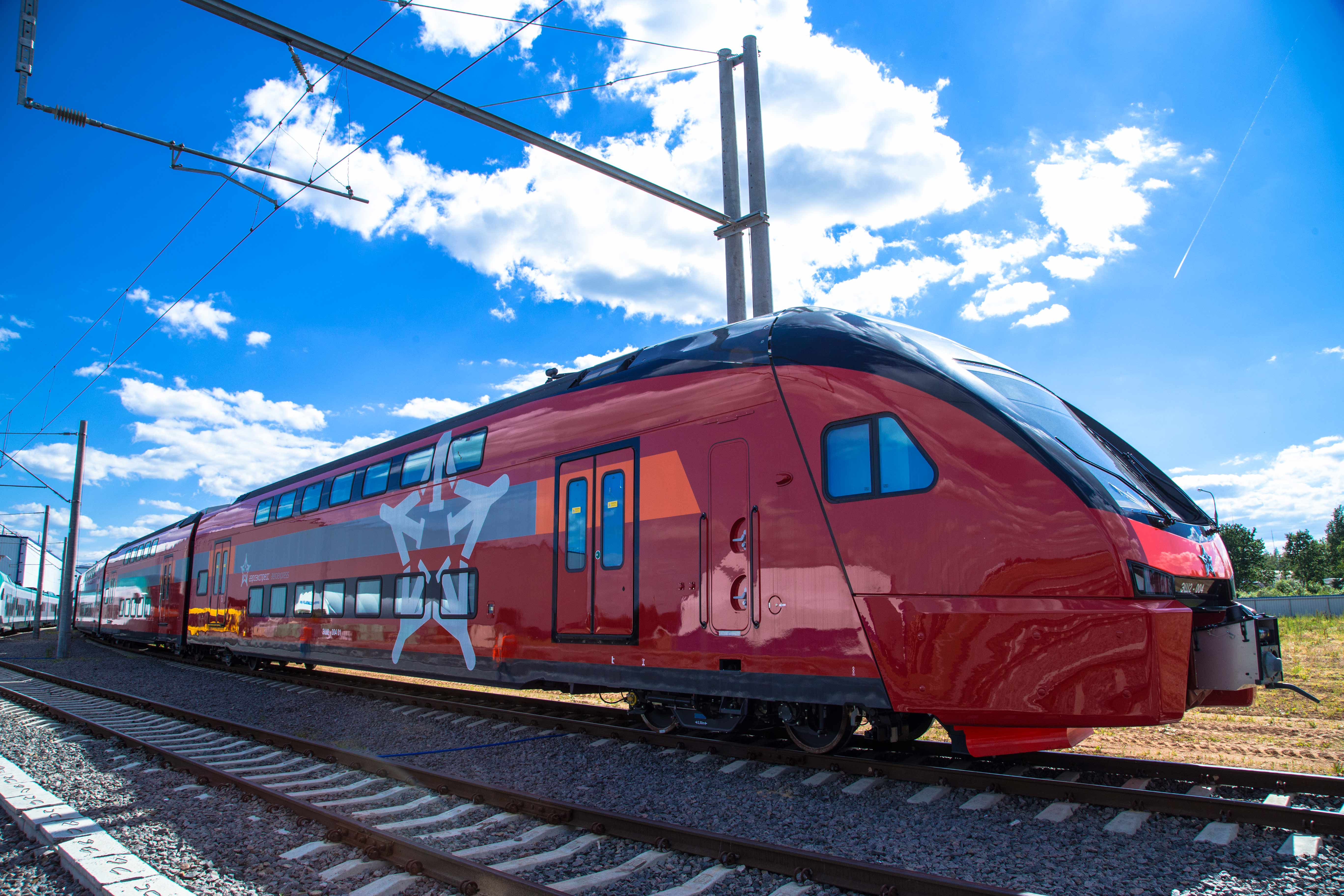 Aeroexpress. Summer photo